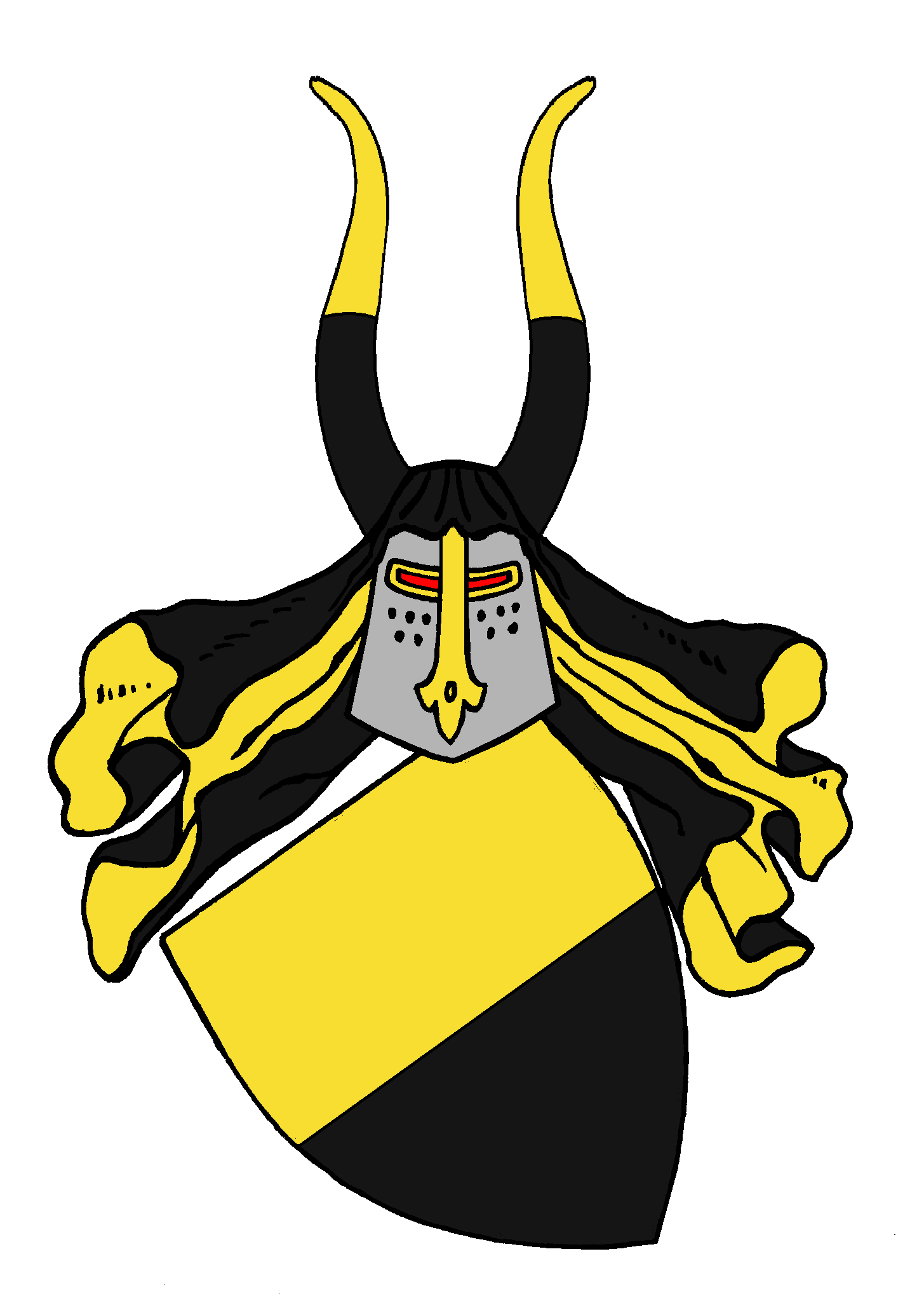 Wappen der Nürnberger Patrizierfamilie Pfinzing von Henfenfeld, um 1300 von den Nürnberger Geuschmid durch Verwandtschaft und Verschwägerung übernommen. [1] , [2]